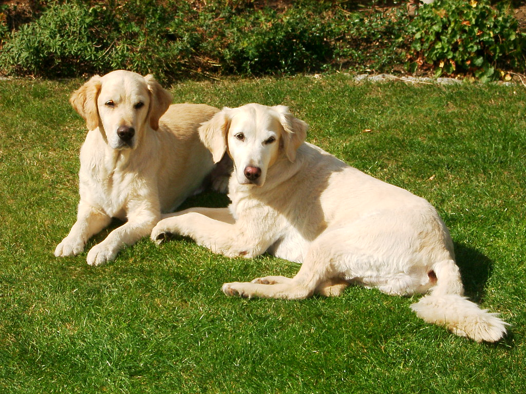 Zwei Golden Retriever im Gras liegend.